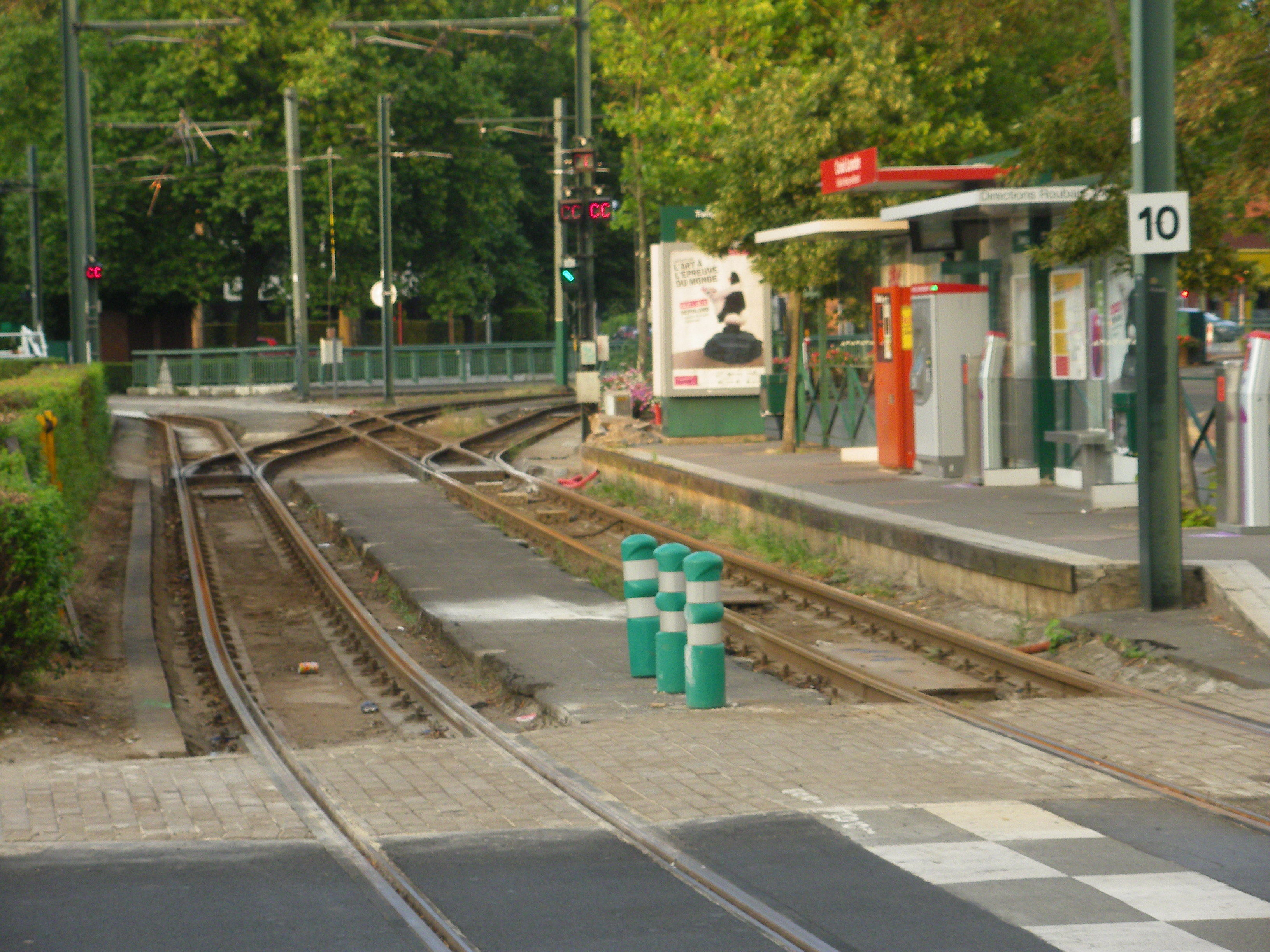 Vue de la station du tramway de Lille-Roubaix-Tourcoing "Croisé-Laroche".